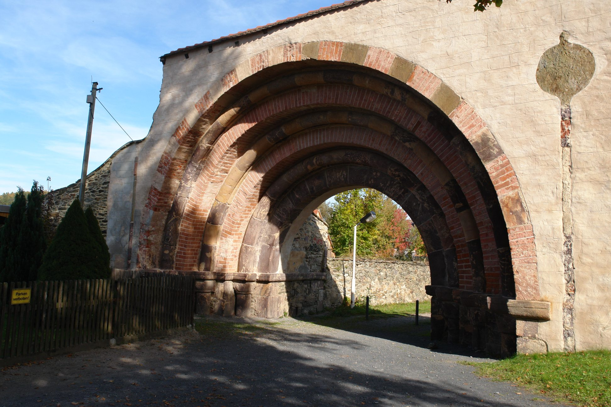 romanisches Tor